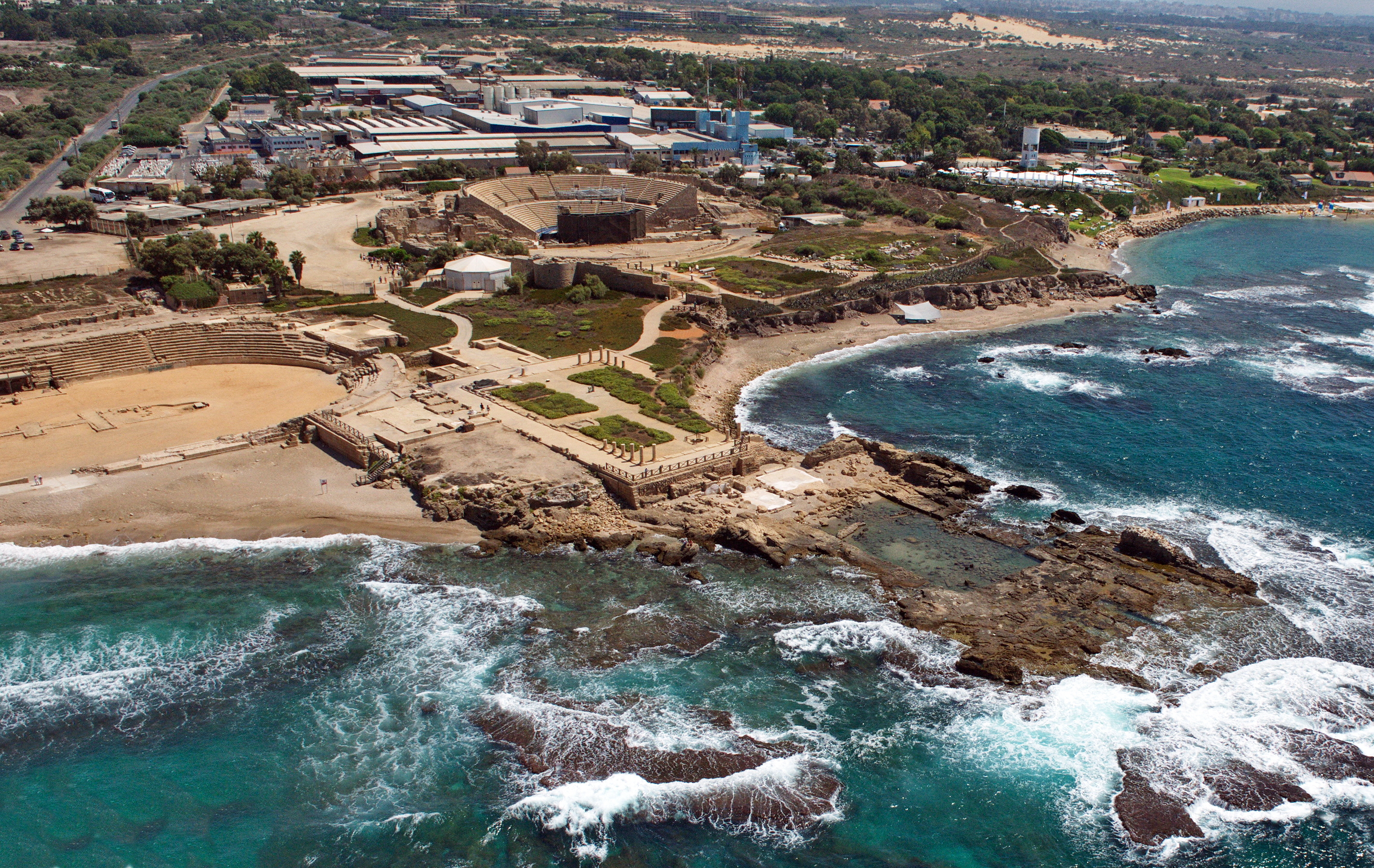 קיסריה היא עיר נמל שהוקמה בשנים 13-25 של לפנה"ס. היא שימשה כבירת ארץ ישראל בתקופה הרומית, ונקראה על שם אוגוסטוס קיסר. כיום העיר העתיקה היא גן לאומי ולידה הוקמה קיסריה המודרנית.